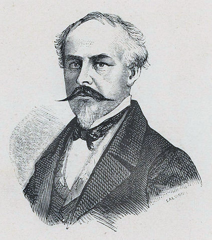 Giovanni Gozzadini